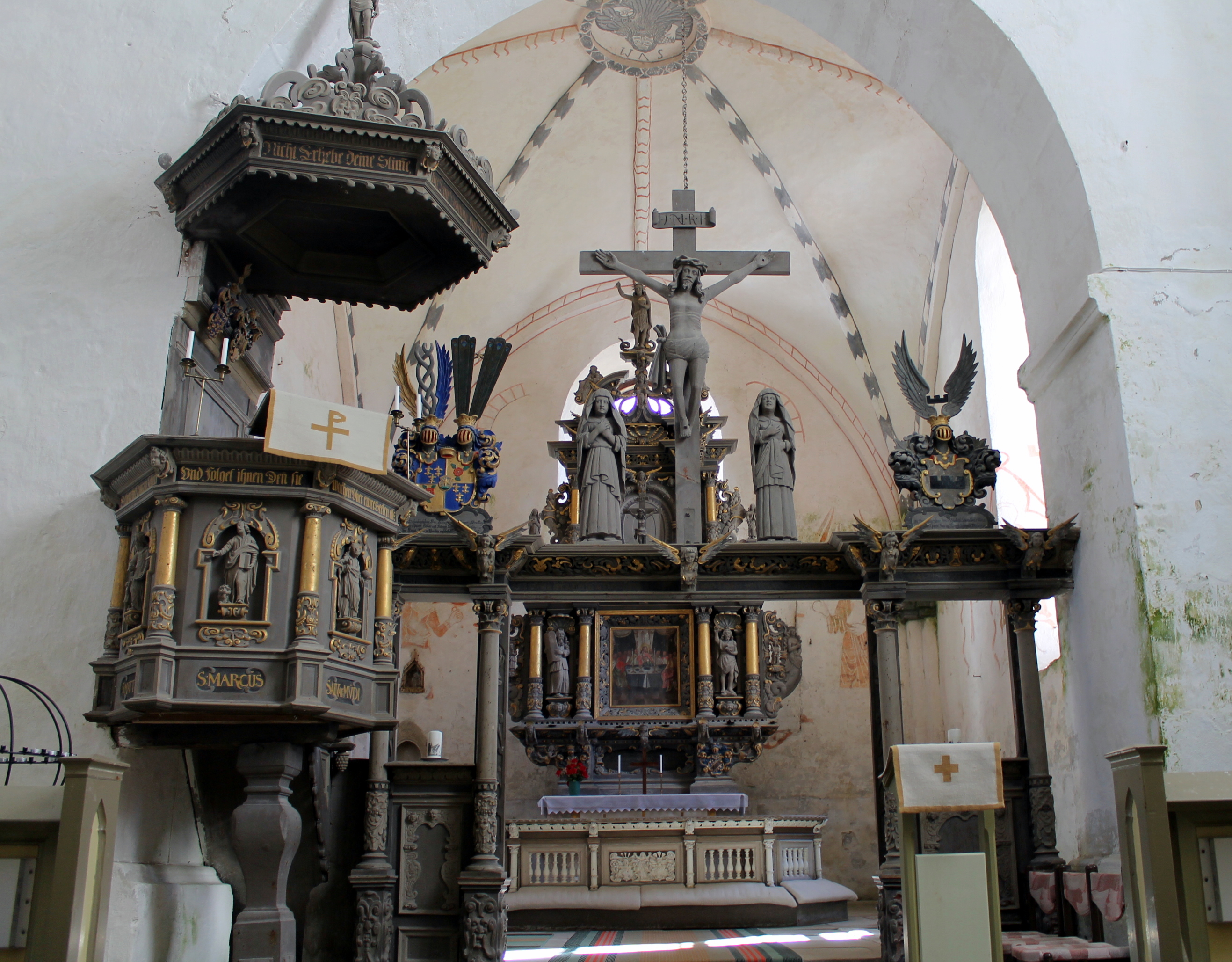 Võidukaare grupp ja vahevõre, B.Lorentz, 1678 (puit, polükroomia)